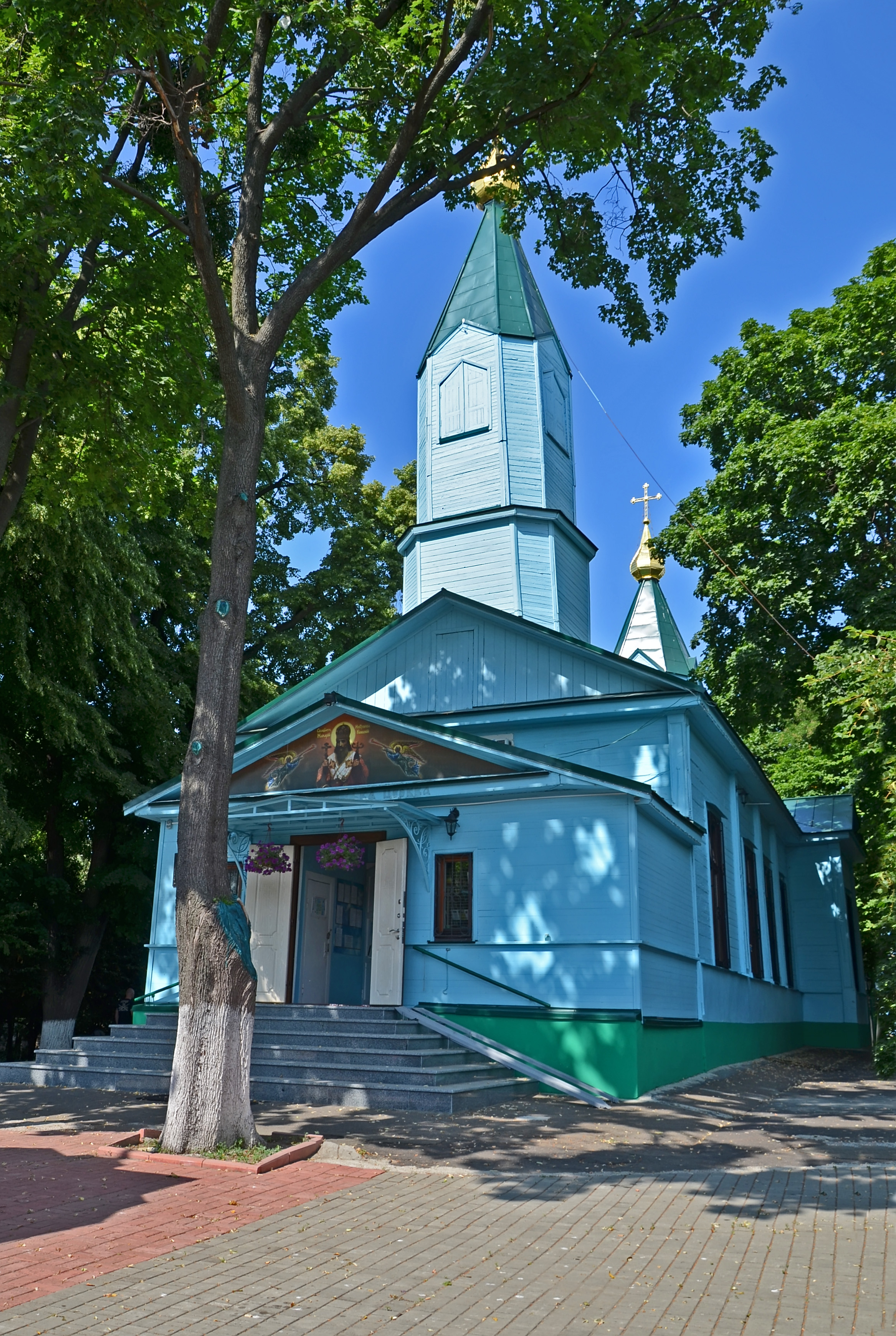 Церква св. Макарія Стара Поляна вул., 46